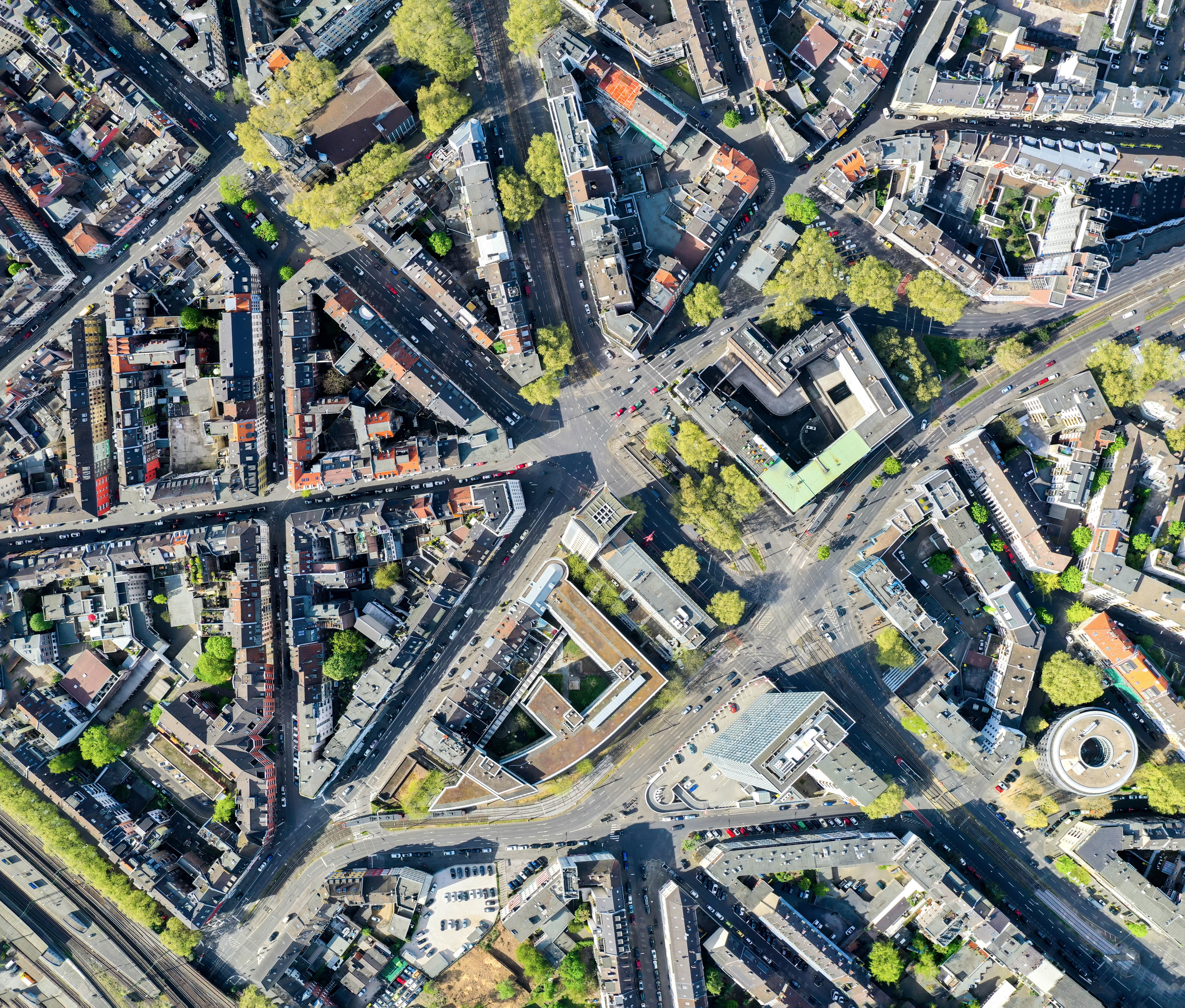 Drohnenaufnahme des Kölner Barbarossaplatzes aus 300 Metern Höhe. Nach der Zerstörung des Platzes am Ende des Zweiten Weltkriegs wurde er inhomogen ab 1946 aufgebaut. Er besitzt keinen Mittelpunkt, sondern wird von Stadtbahngeleisen und Autofahrbahnen zerschnitten. Das Bild besteht aus fünf horizontal aufgenommenen Einzelfotos in zeigt ungefähr die Nord-Süd-Richtung an. Am Bildrand im Südwesten ist der Bahnhof Köln Süd zu sehen. Die Genehmigungen für diesen ungewöhnlich hohen Drohnenflug lag von der Stadt Köln, der Deutschen Flugsicherung und dem REWE-Supermarkt vor; das Parkdeck, von dem ich gestartet war, gehört zu diesem Supermarkt.